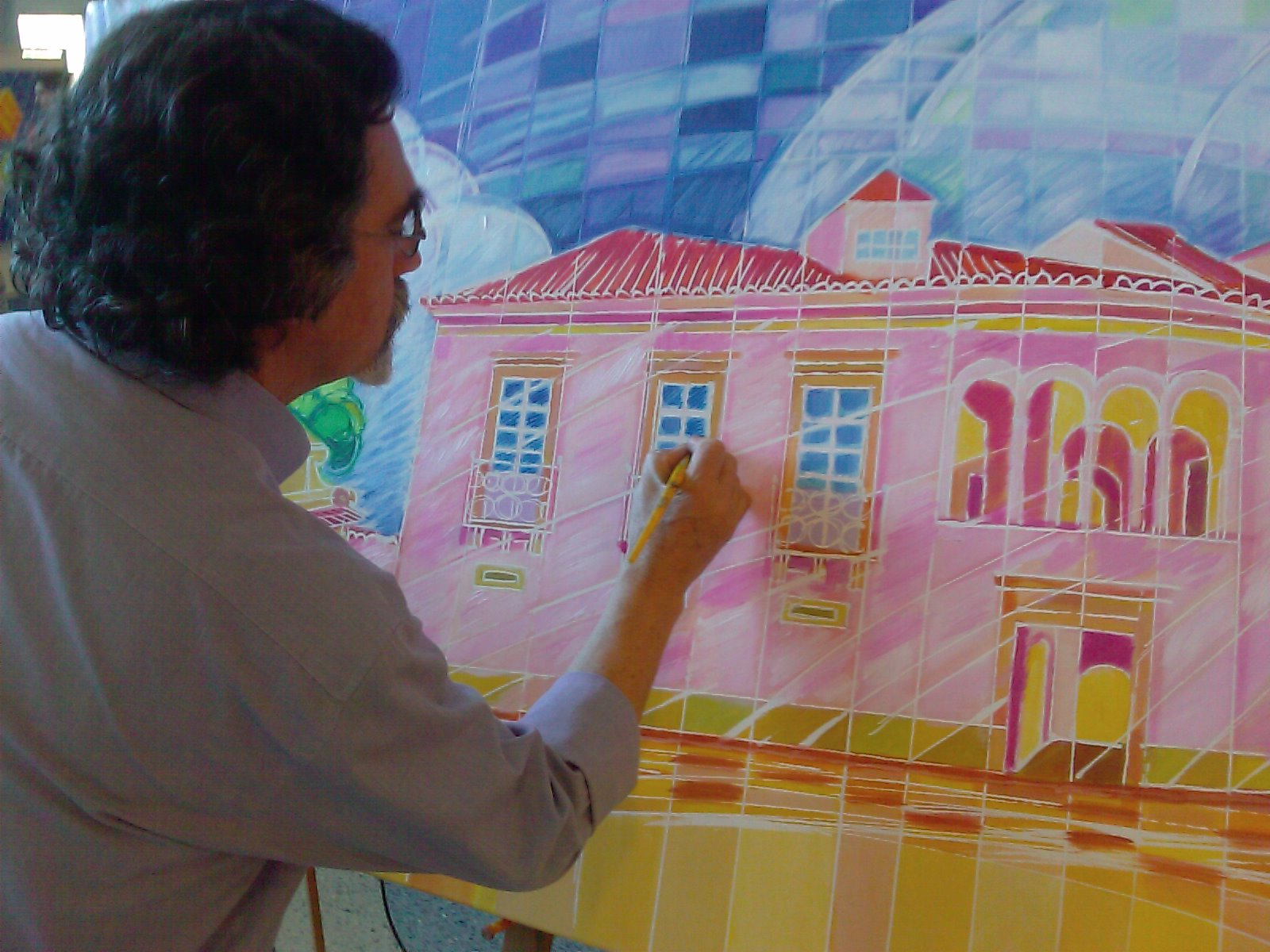 Quadro da Casa dos Arcos pintado por Pombinho